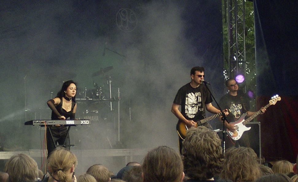 XIII_Stoleti podczas Castle Party w 2003 roku